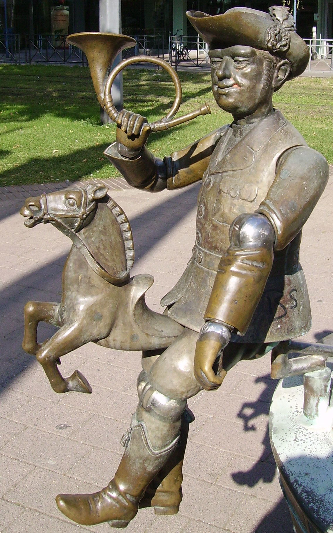 Jäger aus Kurpfalz, Ludwigshafen in Rheinland-Pfalz (Germany), a work by Bonifatius Stirnberg (1991)